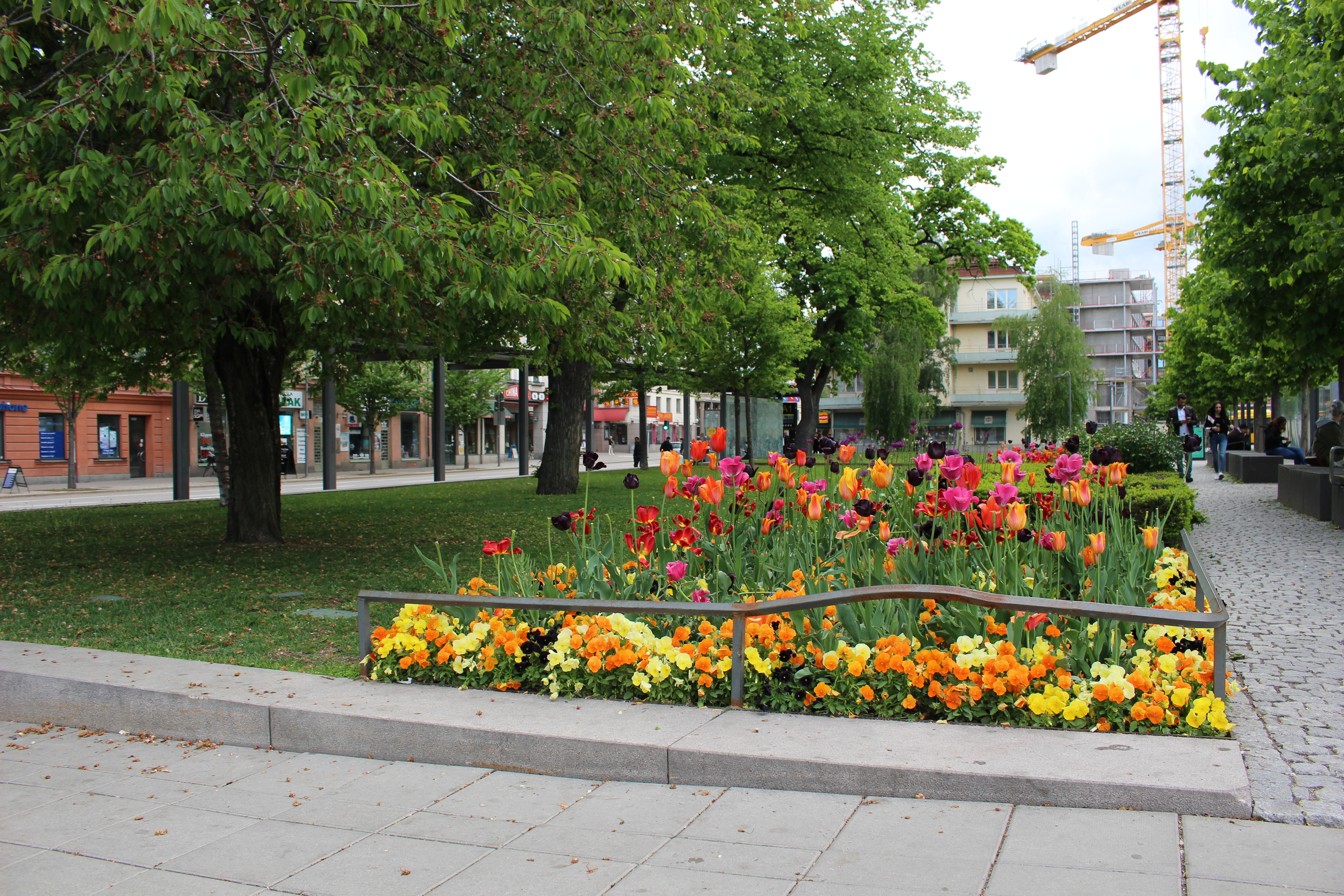 Gunnar Leches park från sydost.